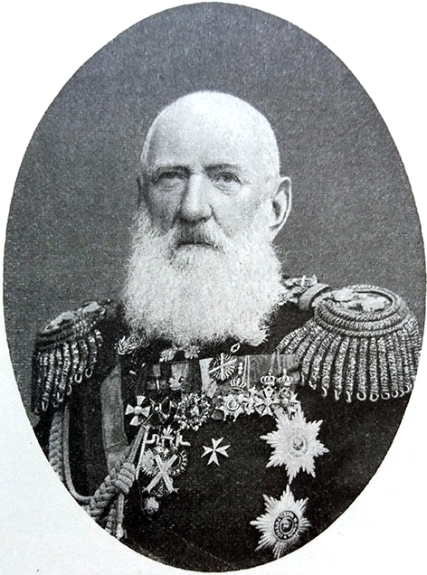 Генерал-адъютант граф Логин Логинович Гейден